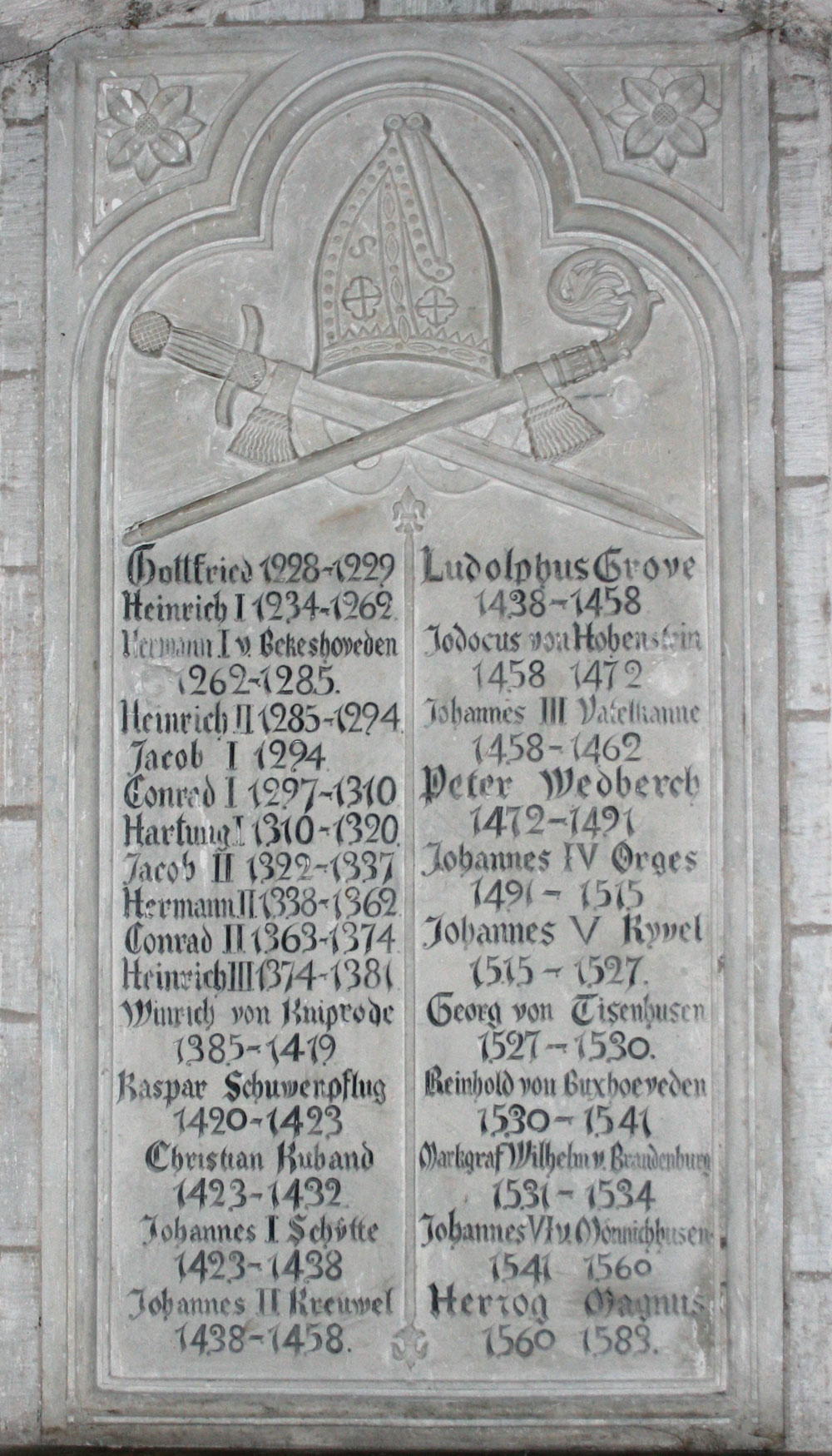 Saare-Lääne piiskoppide loend Kuressaare linnuses